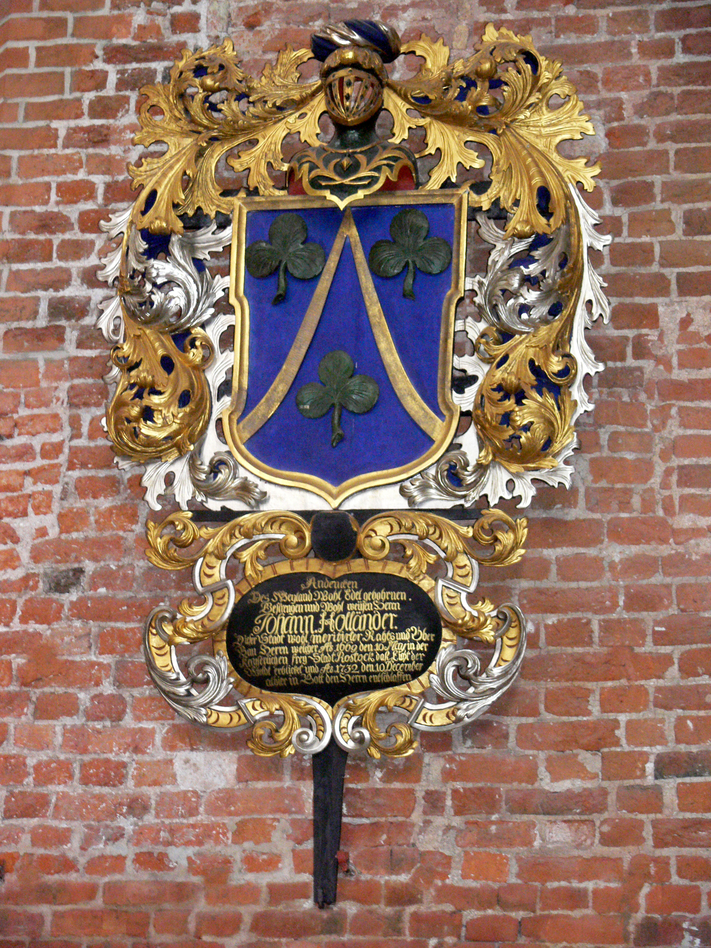 Coat of arms of Johann Holländer, Ratsherr und Oberbauherr in Riga 1669 in Rostock—1732 in Riga). In der Kirche St. Peter in Riga.